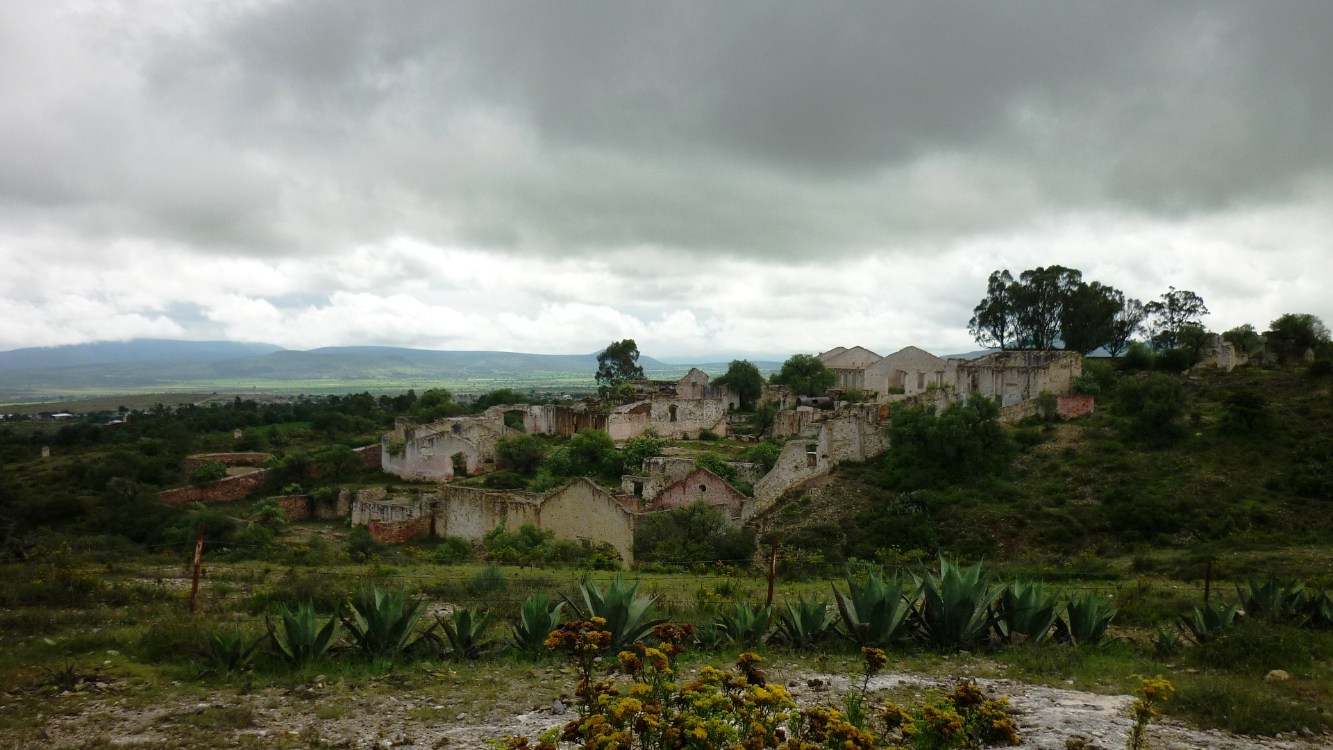 Uno de los más importantes pueblos mineros del siglo XIX en México.